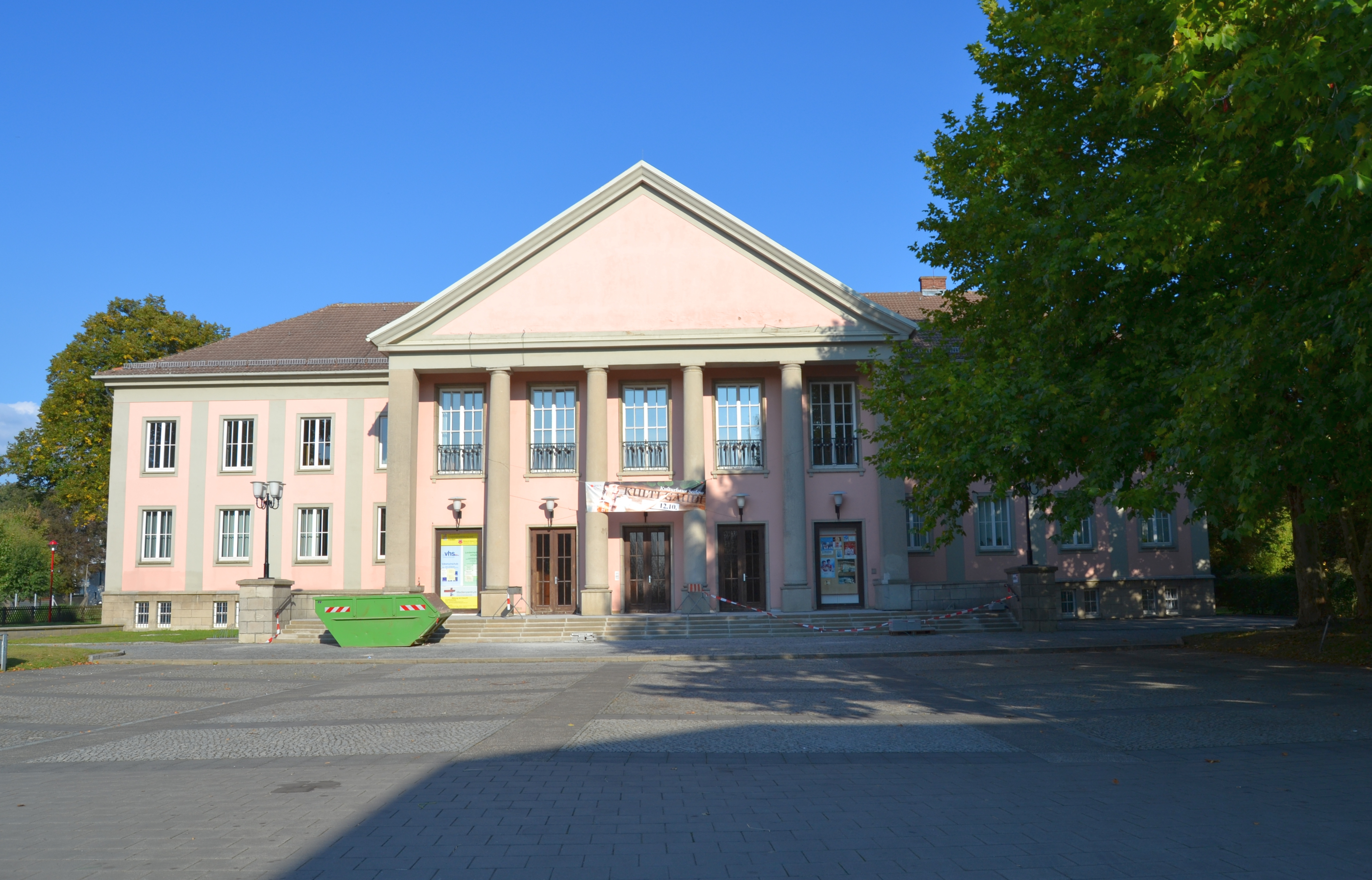 Kulturhaus „Erich Weinert“ in Seelow mit Vorplatz und parkartigen Außenanlagen einschließlich Trafohaus und OdF-Denkmal.